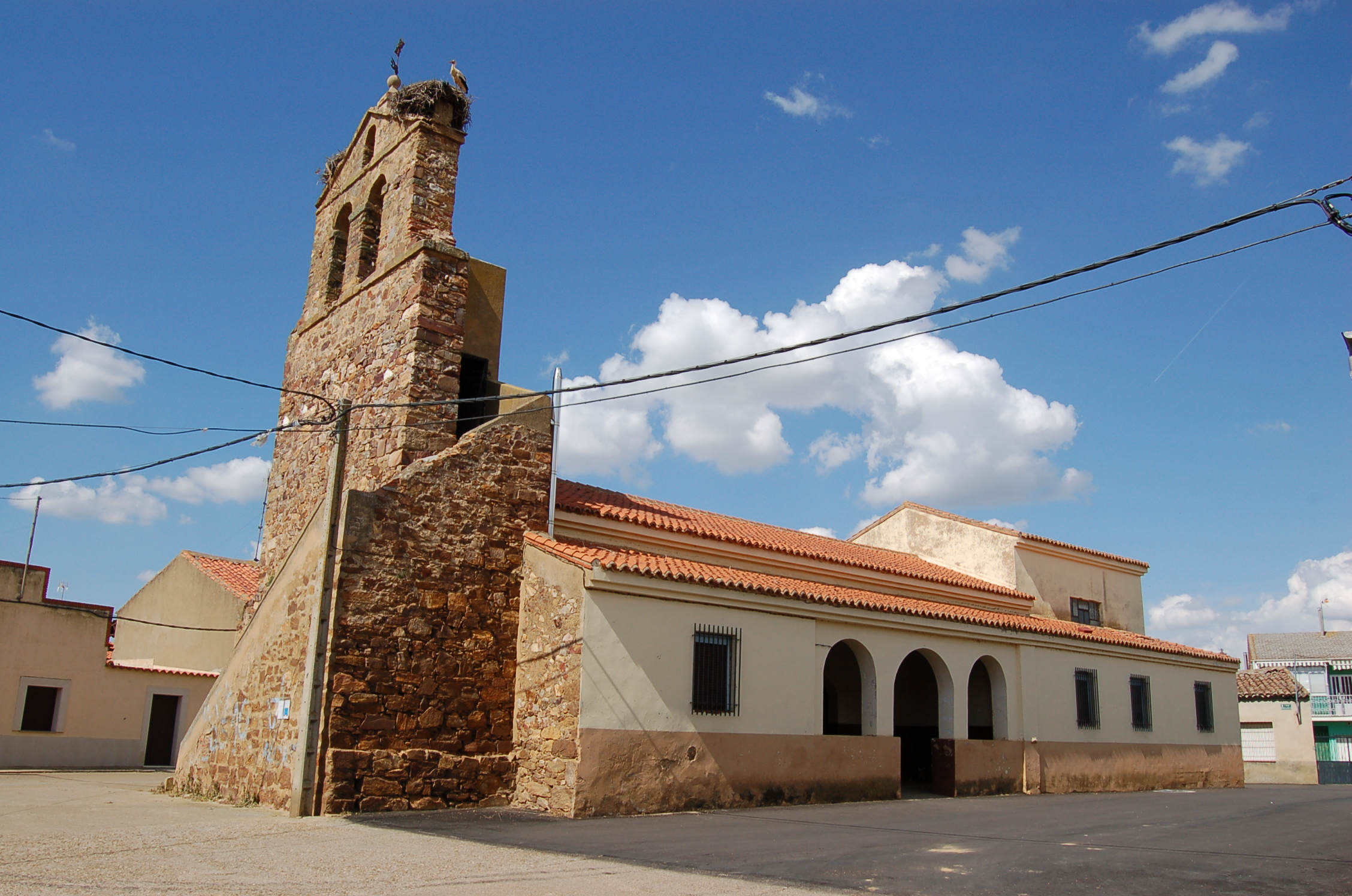 Igrexa Arcos de la Polvorosa